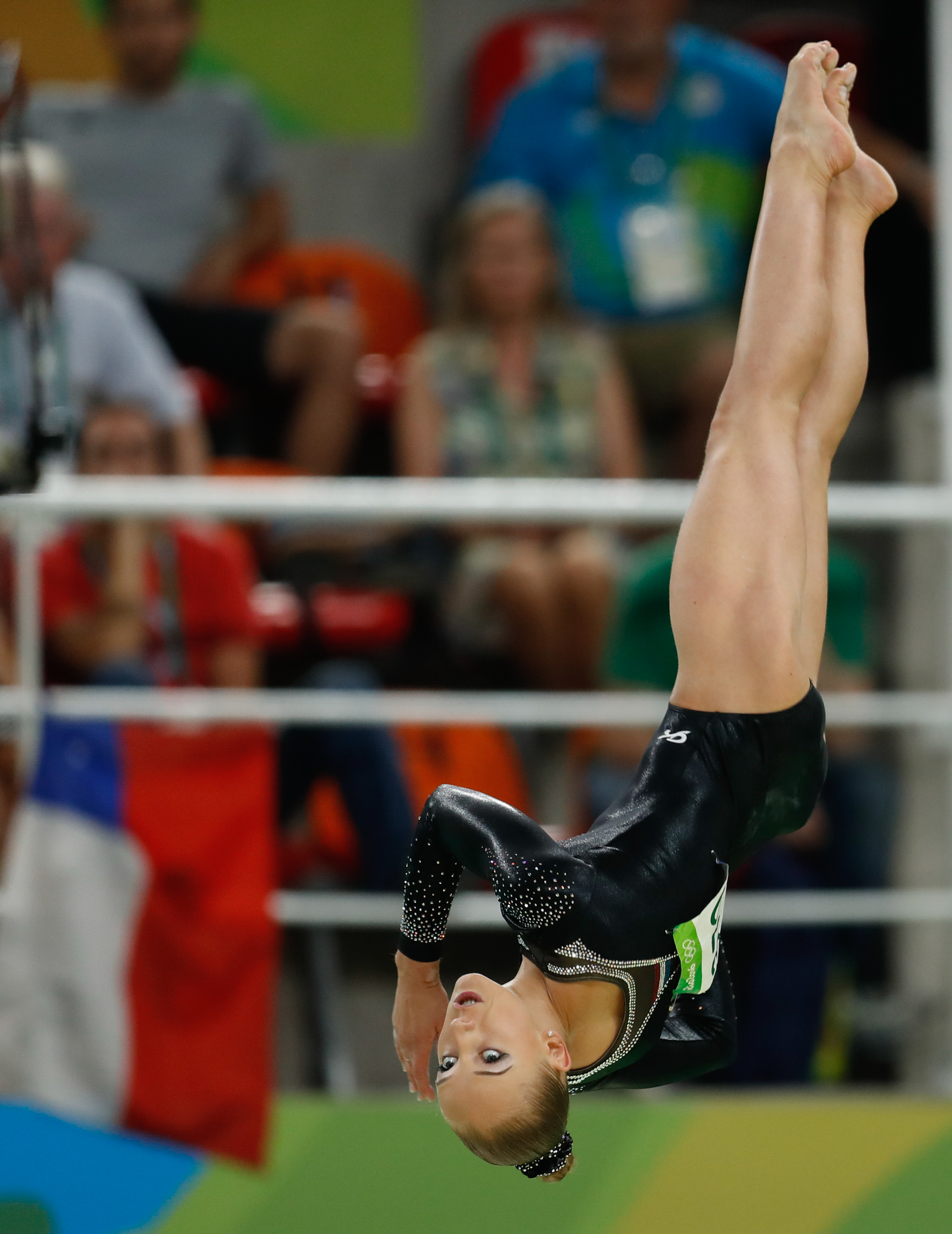 Rio de Janeiro - Ginasta da Holanda Sanne Wevers leva medalha de ouro ao vencer a prova final por aparelhos da trave (Fernando Frazão/Agência Brasil)